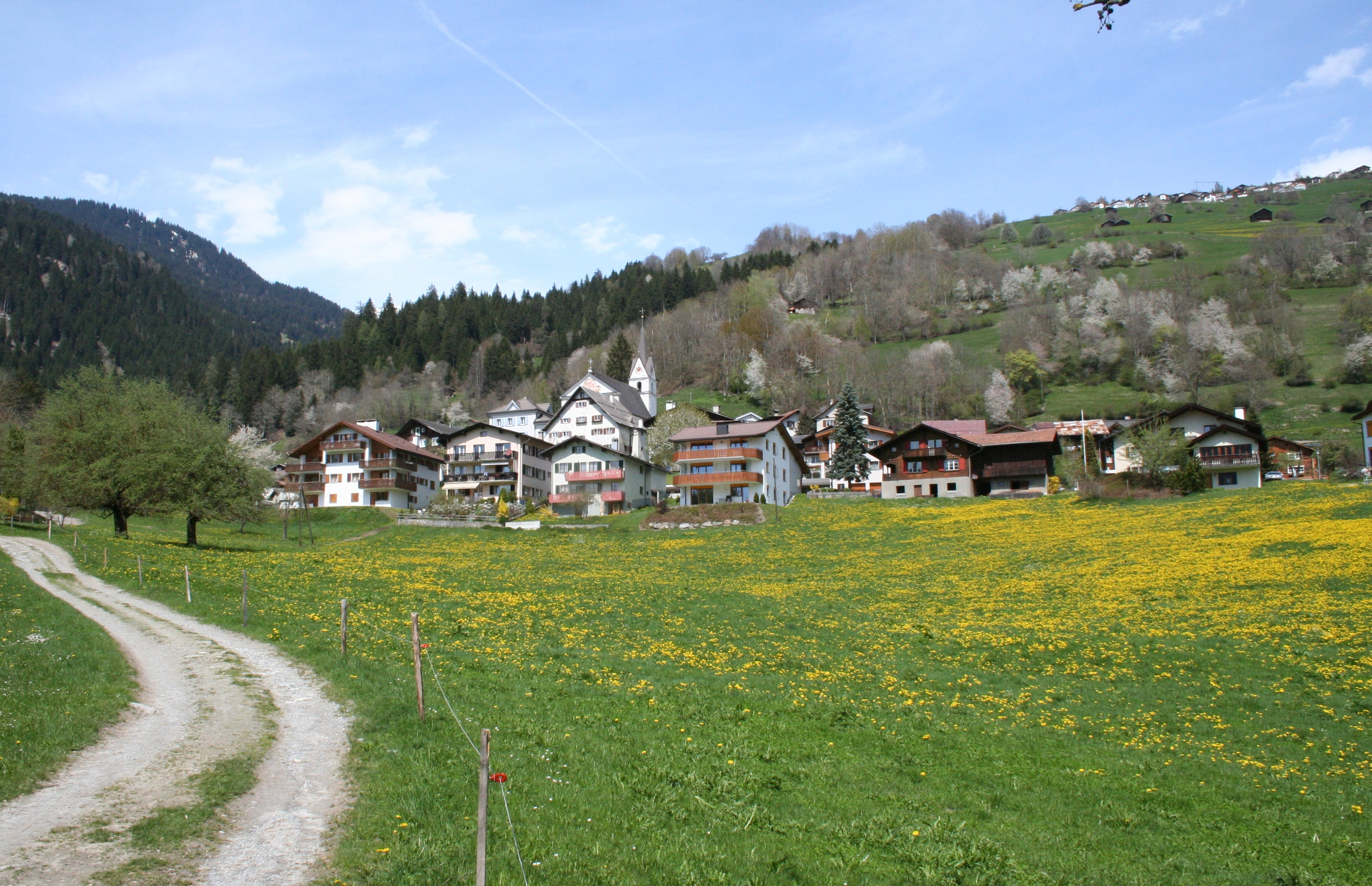 Schluein GR